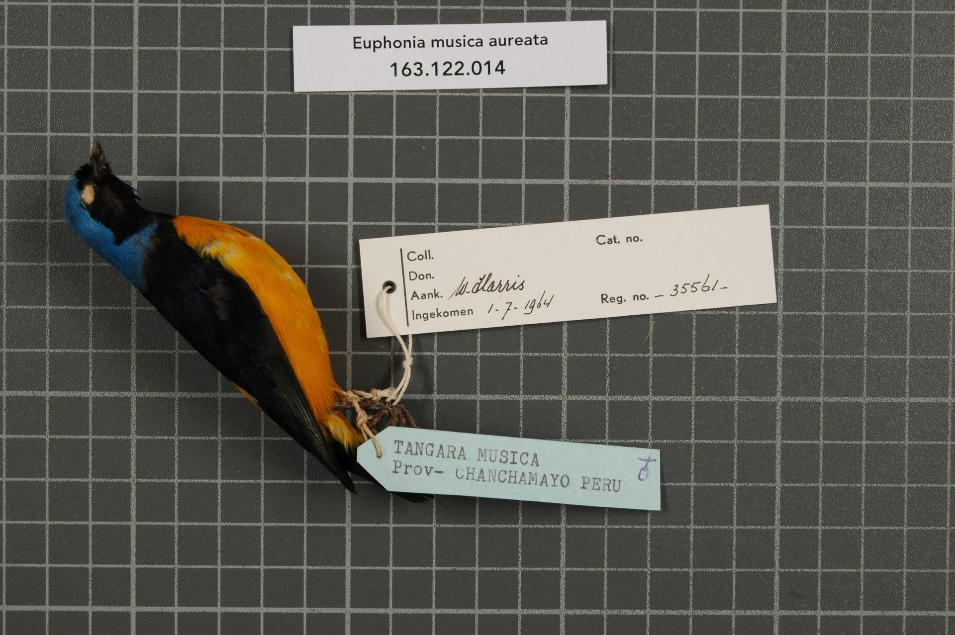 Euphonia musica aureata (Vieillot, 1822)